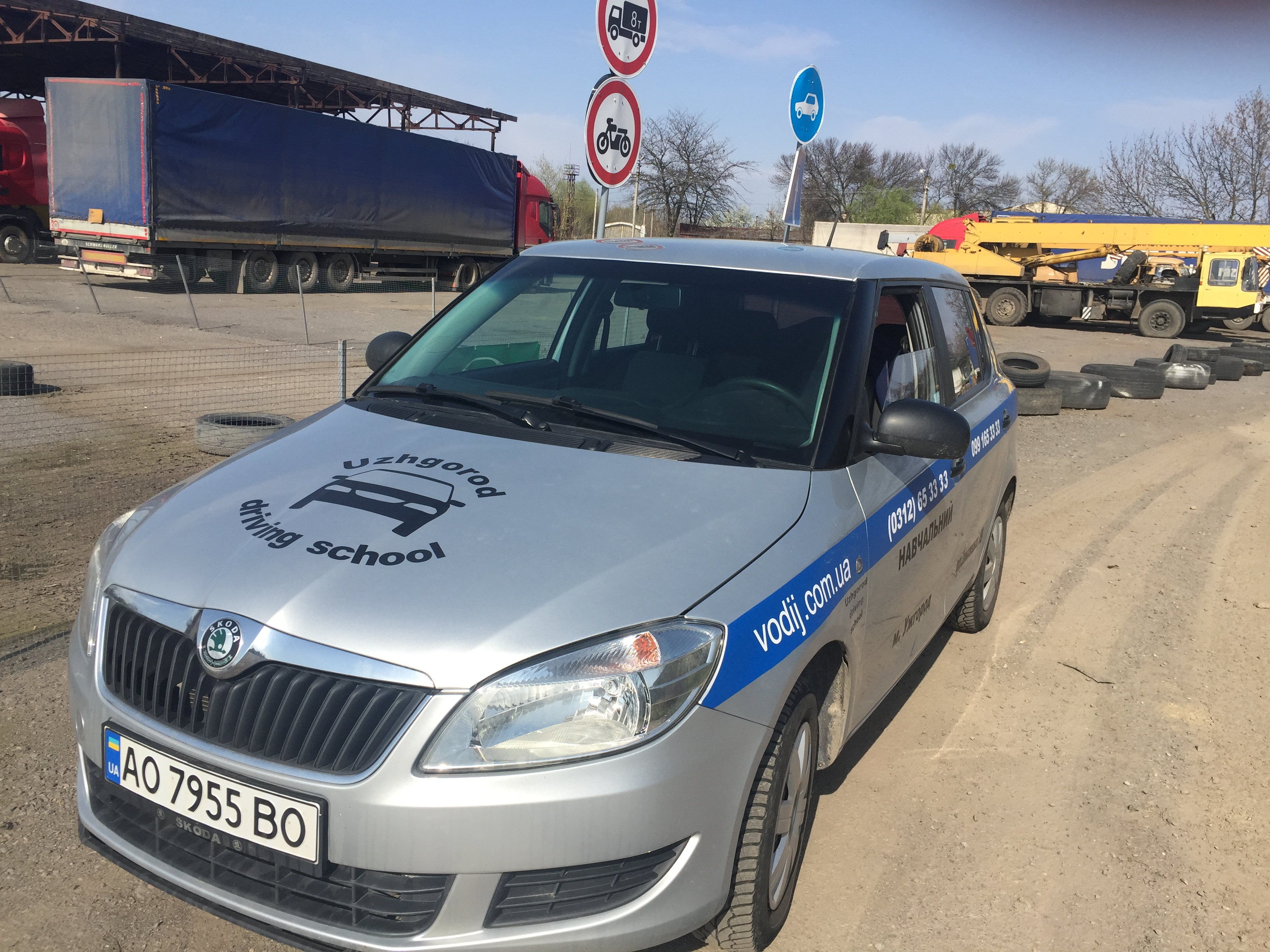 Легковий навчальний транспортний засіб